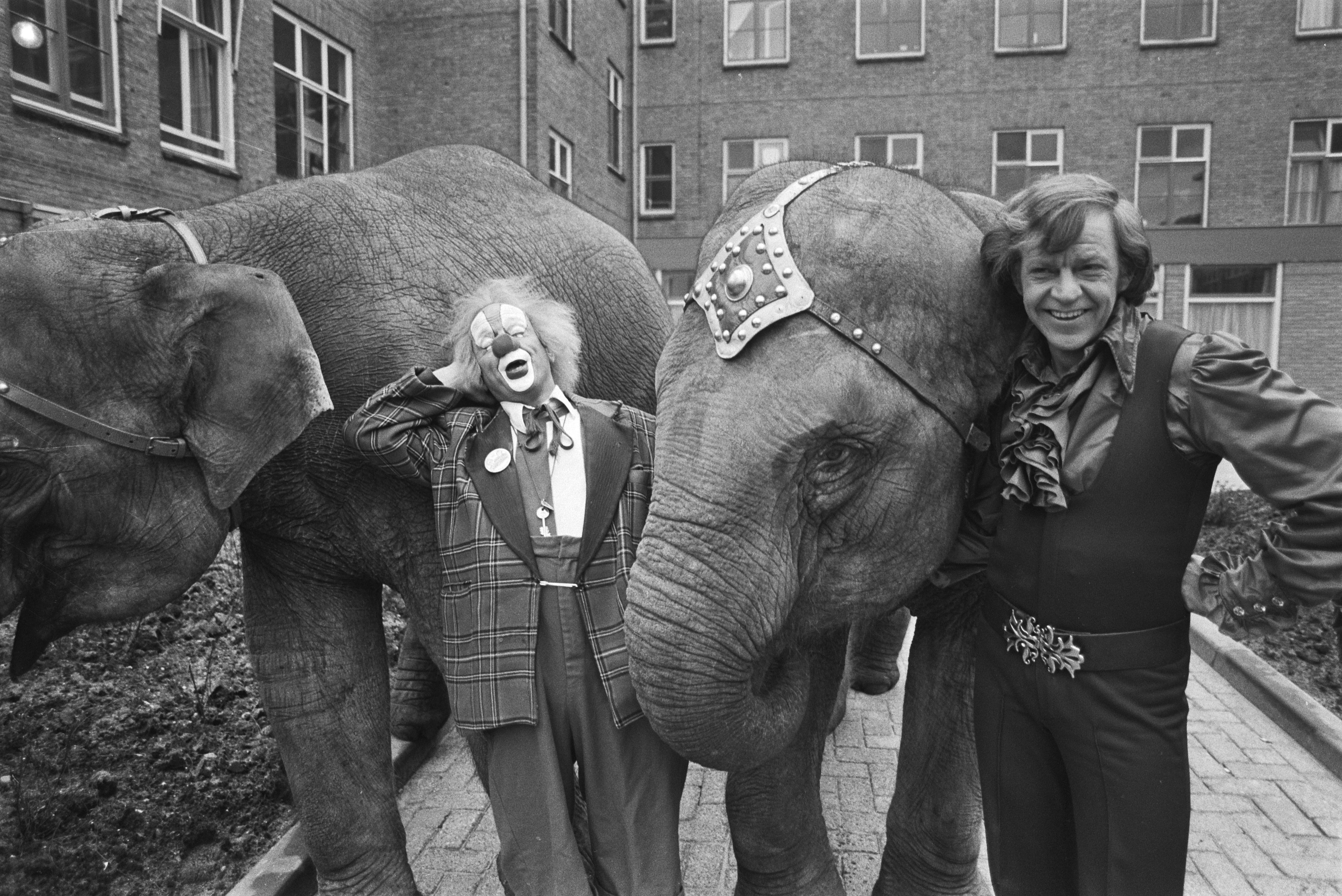 Collectie / Archief : Fotocollectie Anefo Reportage / Serie : [ onbekend ] Beschrijving : Opening overbruggingspaviljoen "De Hoogstraat" door Margriet, hier het clownsduo Bassie en Adriaan met twee olifanten Datum : 18 november 1980 Trefwoorden : clowns, olifanten Fotograaf : Dijk, Hans van / Anefo Auteursrechthebbende : Nationaal Archief Materiaalsoort : Negatief (zwart/wit) Nummer archiefinventaris : bekijk toegang 2.24.01.05 Bestanddeelnummer : 931-1561